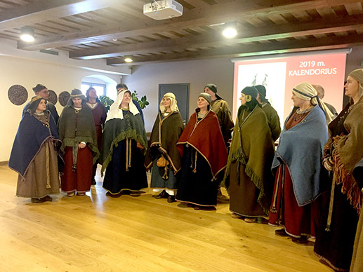 Atkurti autentiški Sėlių genties kostiumai